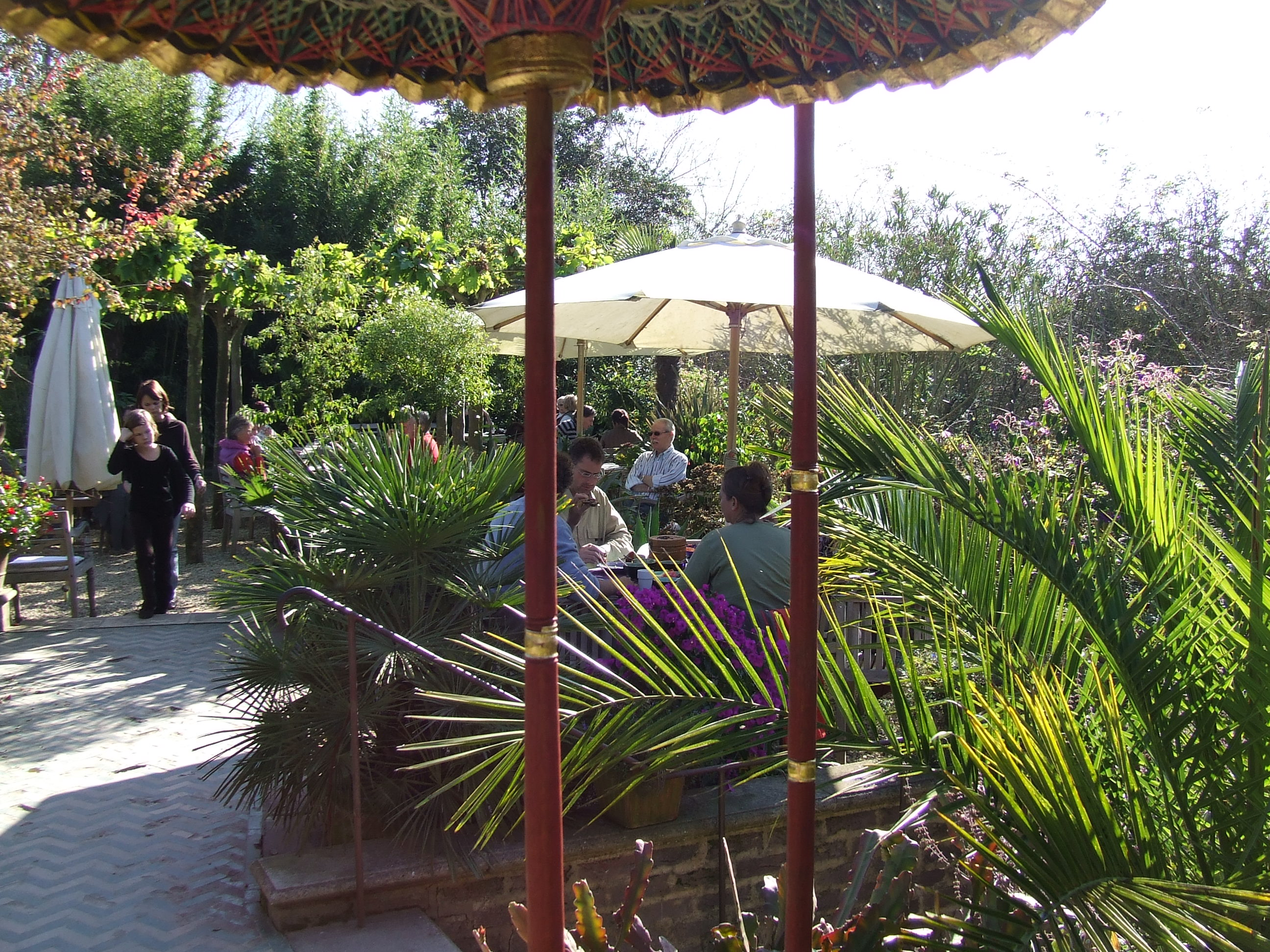 Zicht op het terras in een deel van de Millinger Theetuin, Klaverland 9, 6566 JD Millingen aan de Rijn